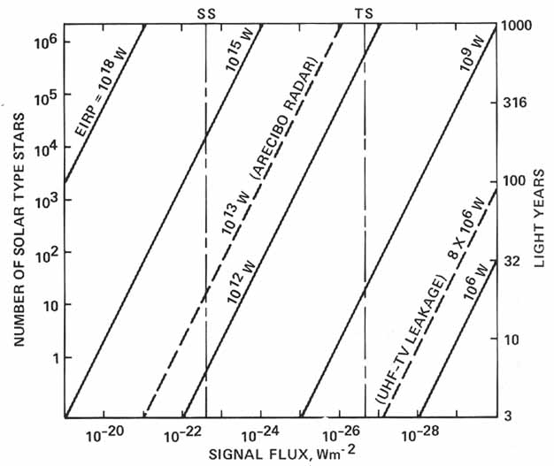 Sensitivity vs Range for SETI.